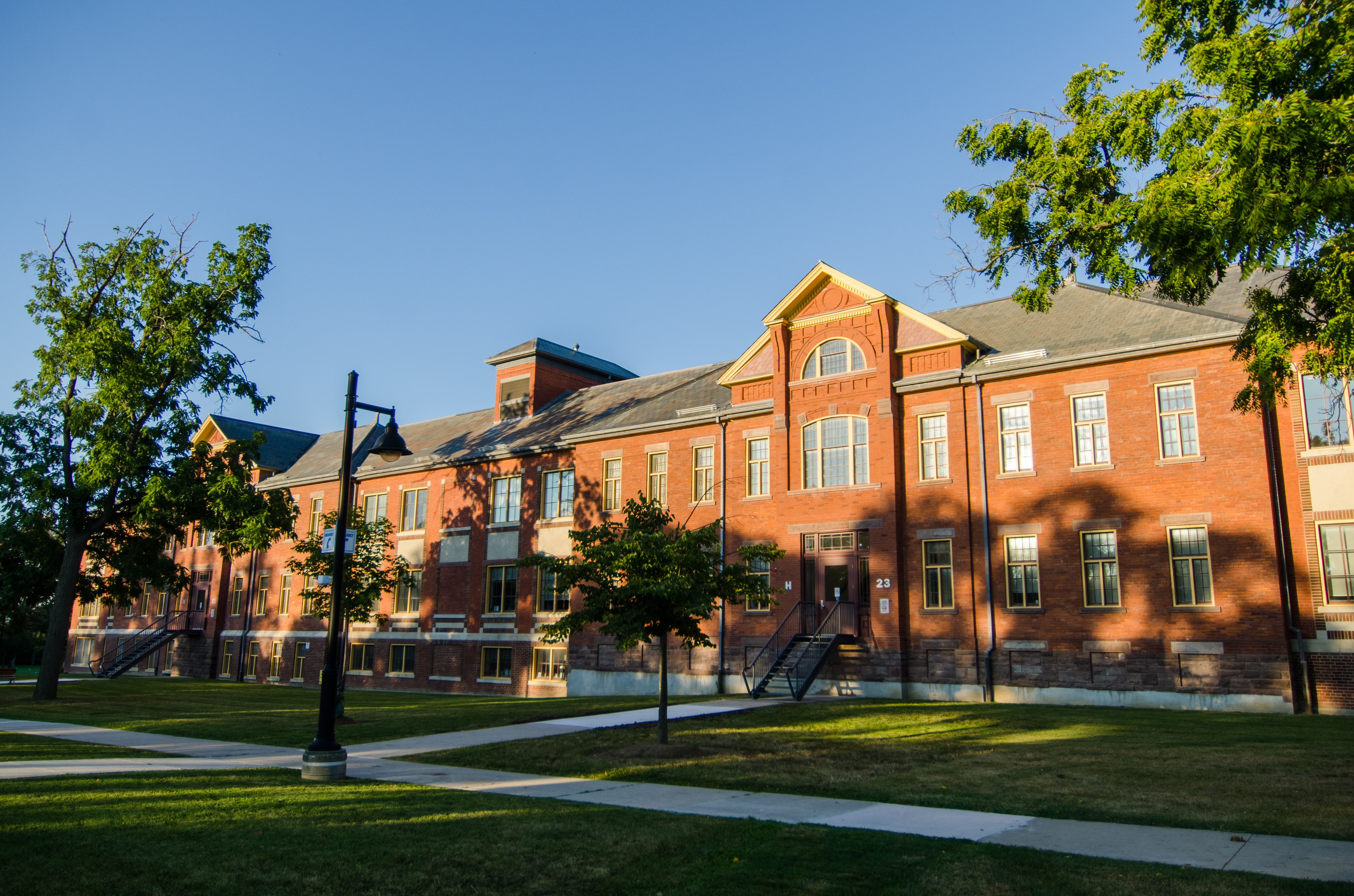 Seen in Conviction episode #110.